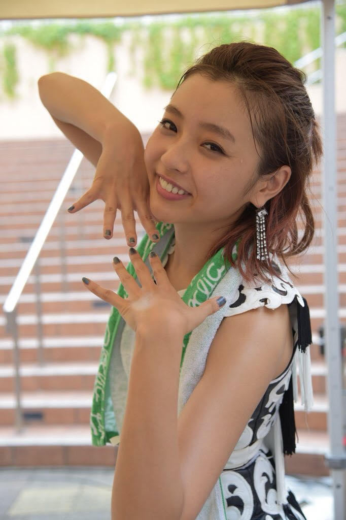 2018年「カーテンコール」リリースイベントにて